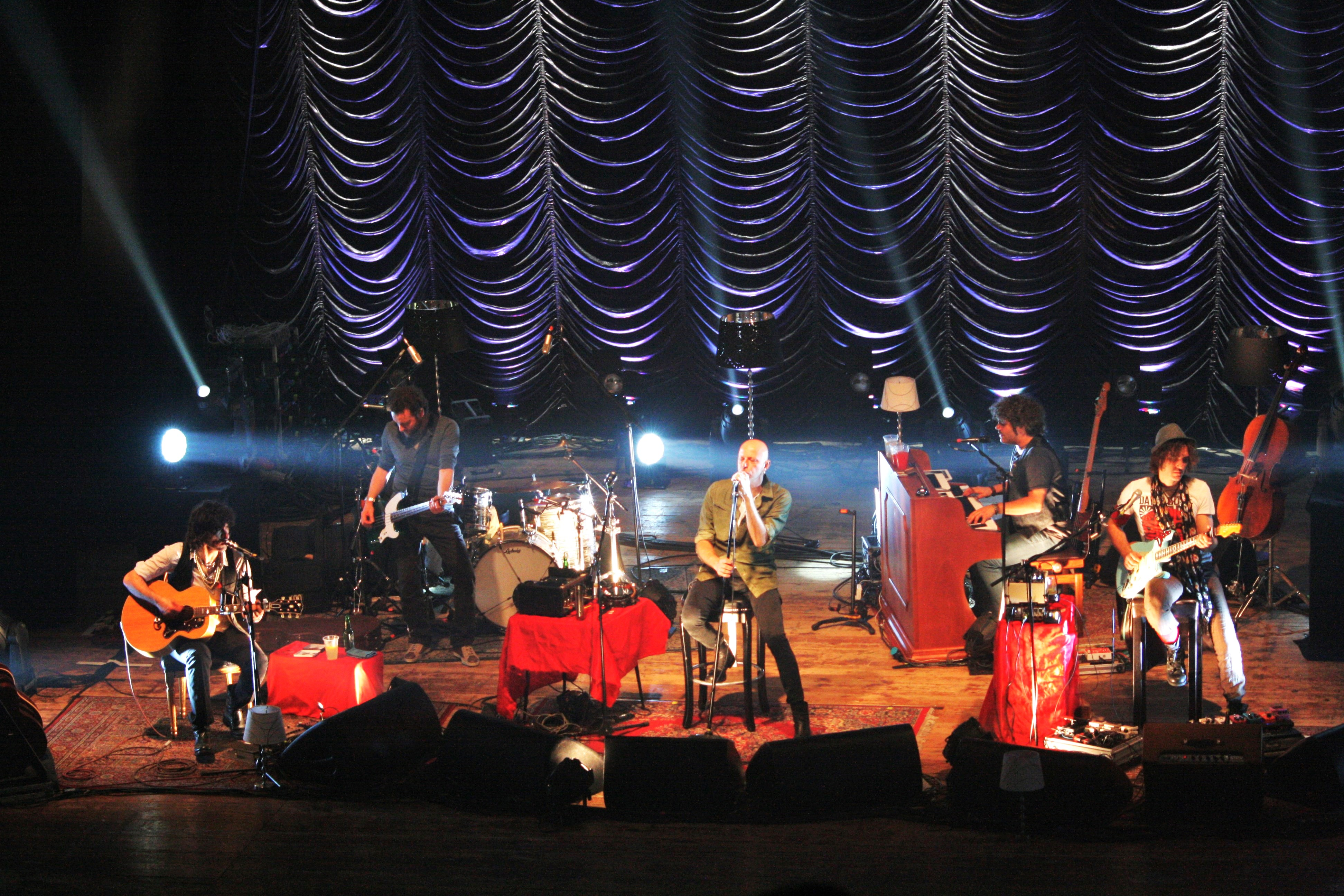 (c)Salvatore Gentile